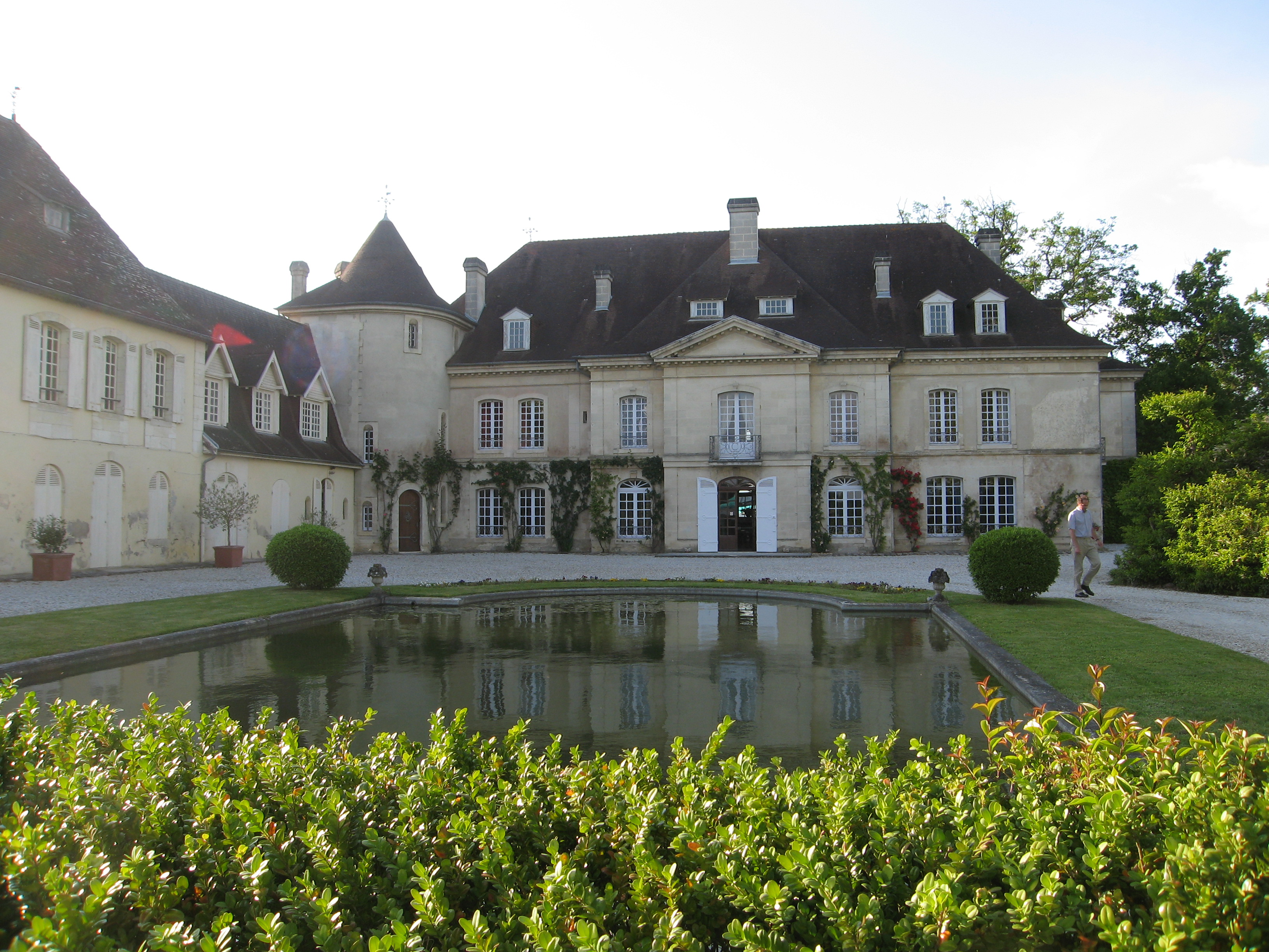 Château Bouscaut, Cadaujac, Aquitaine, France